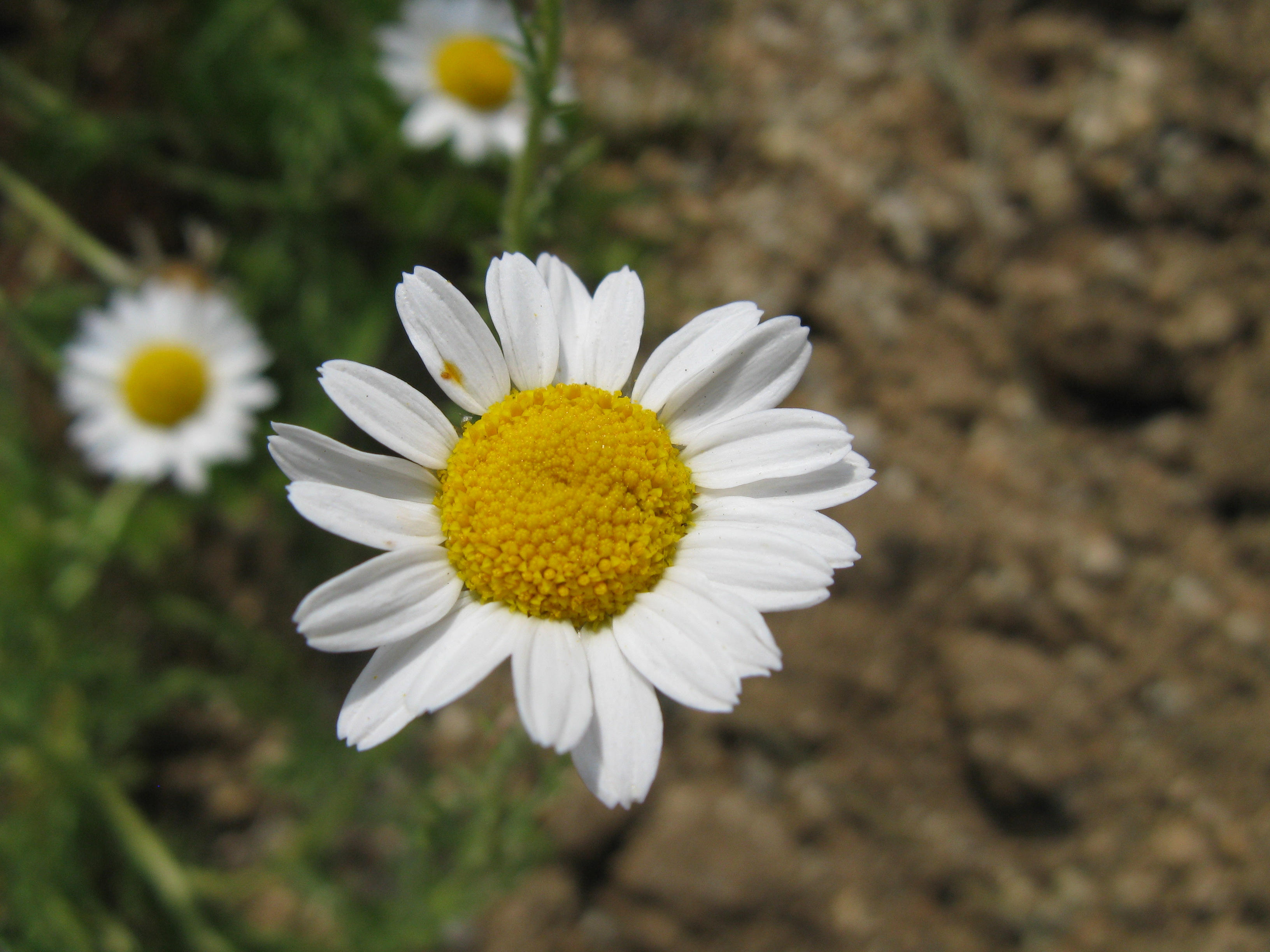 Scientific name Chamaemelum nobile